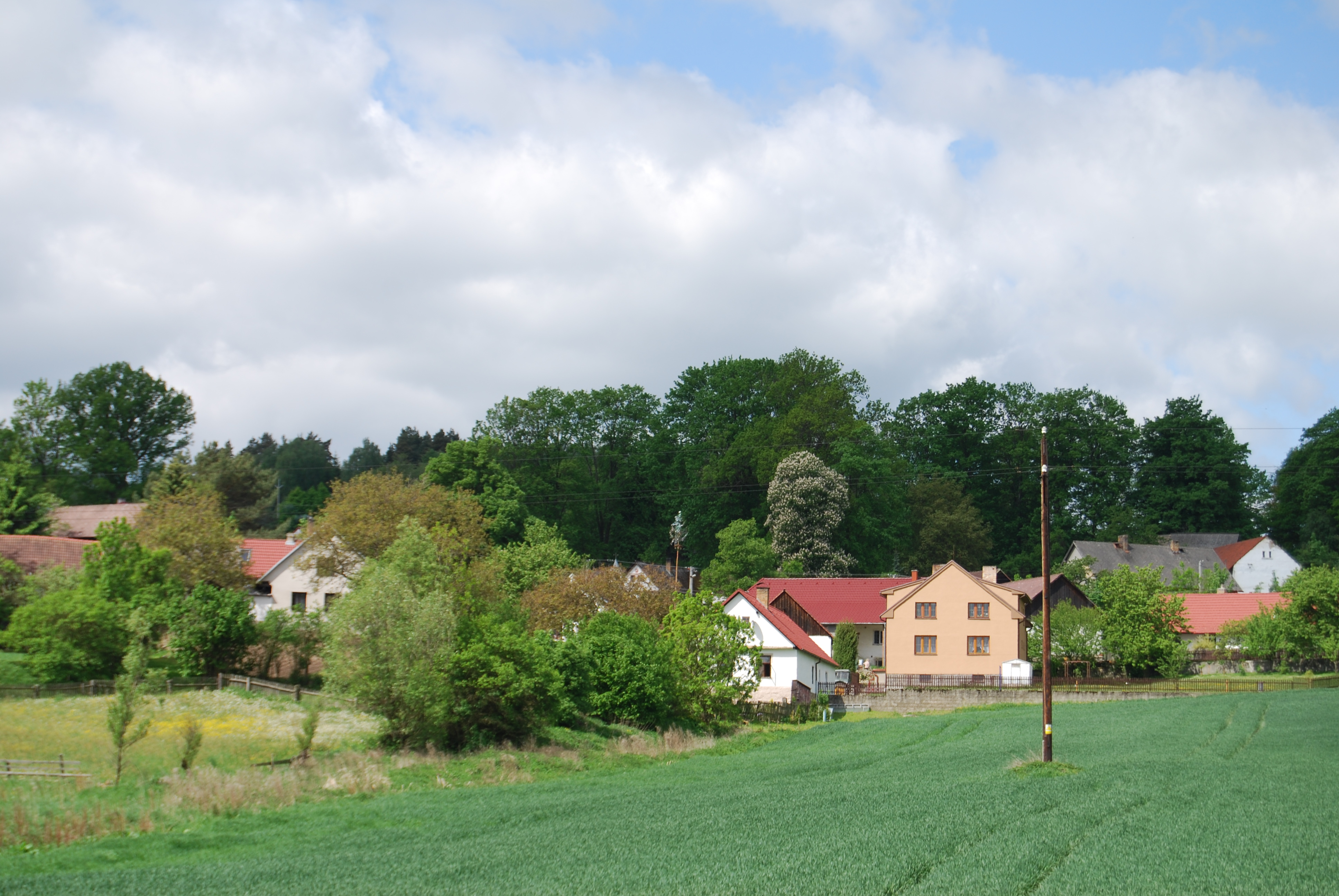 Pohled na obec z komunikace do Milevska. Březí je malá vesnice, část obce Zhoř v okrese Písek. Česká republika.